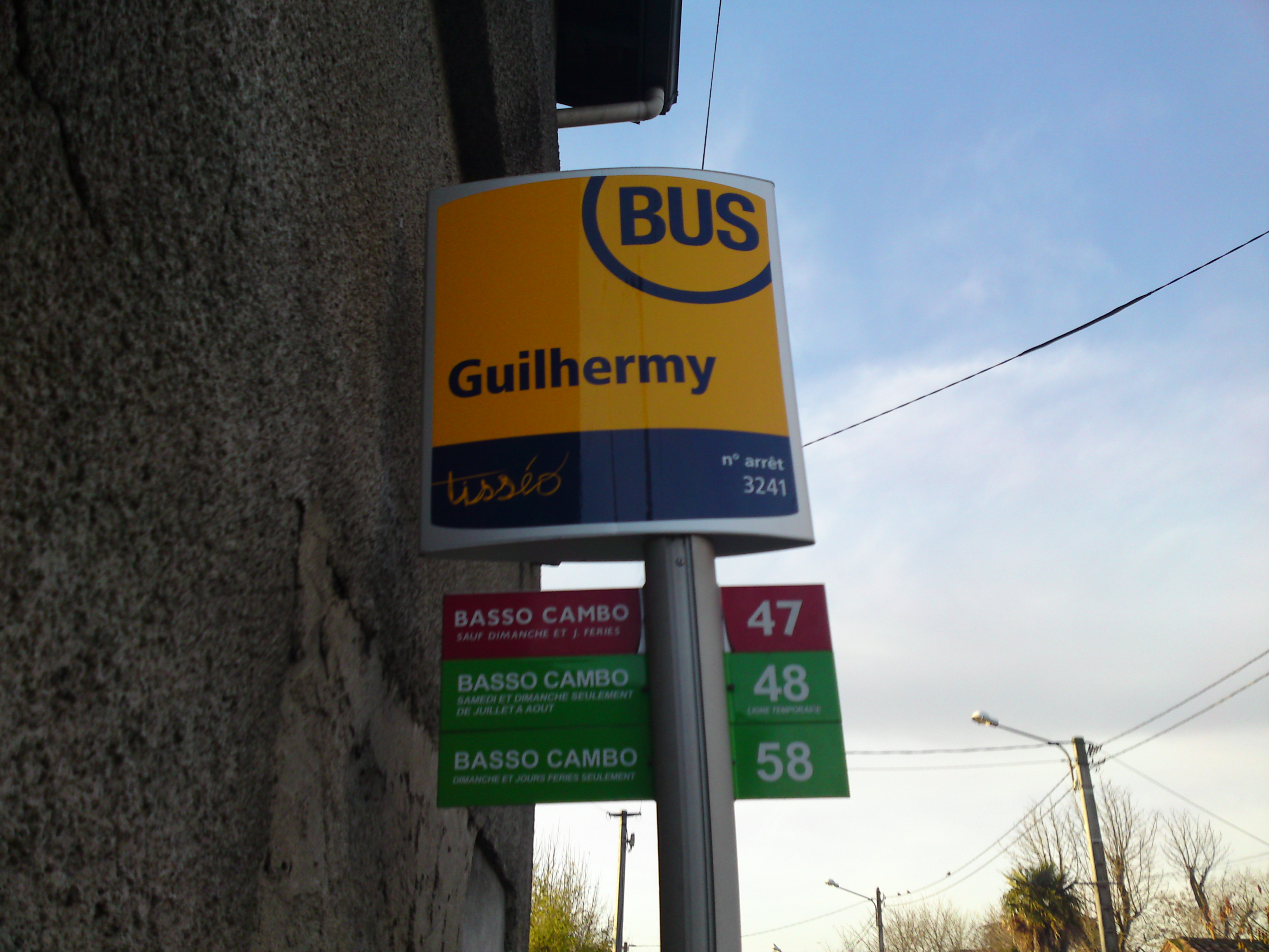 Arrêt de Bus à Toulouse : ligne 47